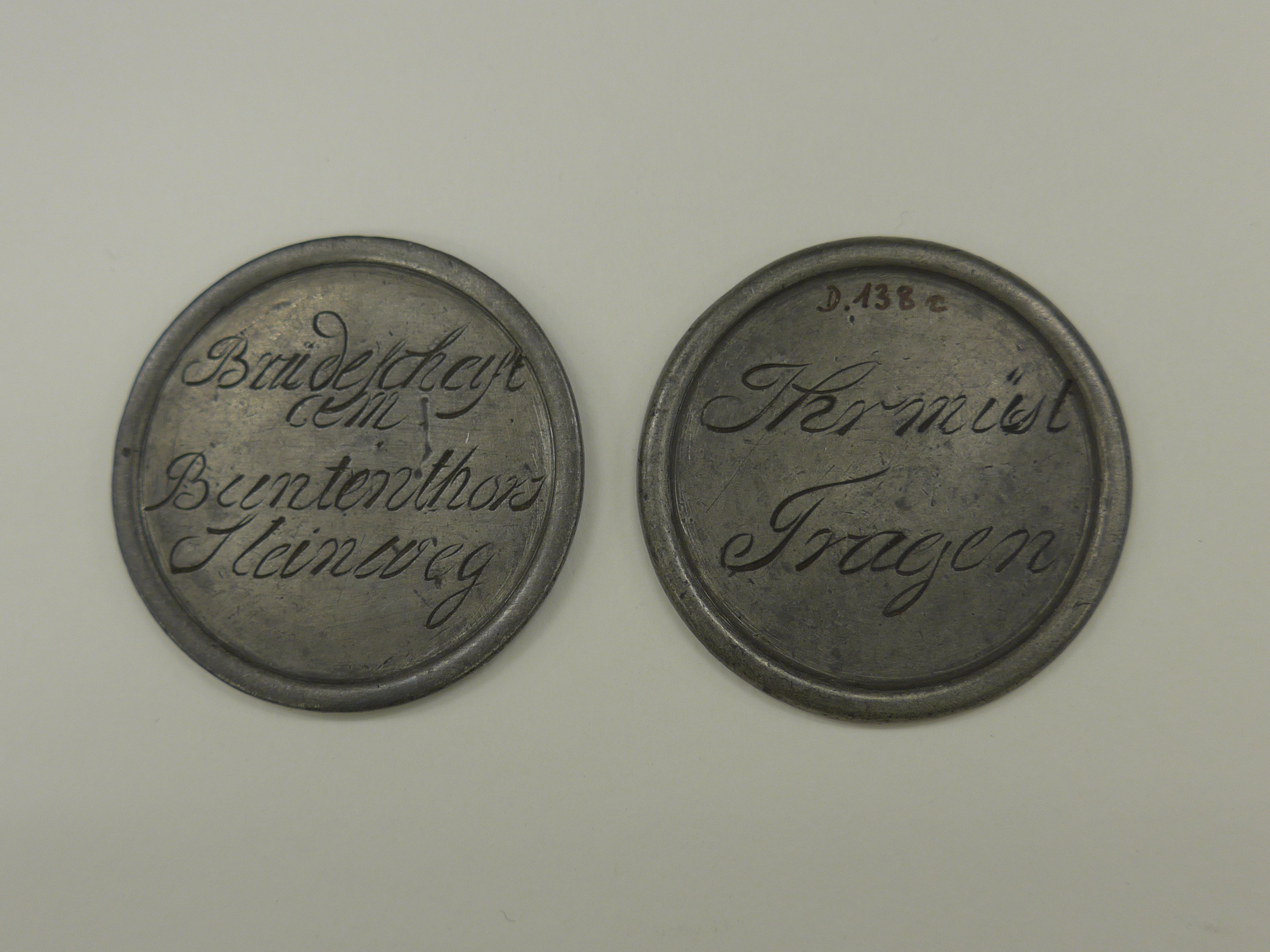 Bricke. Vorder- und Rückseite. Botenzeichen einer Bremer Sterbekasse (Brüderschaft, Totenlade) an die Mitglieder, die an der Reihe waren, den Sarg zu tragen. Zinn, graviert, Dm 5,5 cm. Bremen, 1. Hälfte des 19. Jhdts. Focke-Museum Bremen, Inv.Nr. D.0138